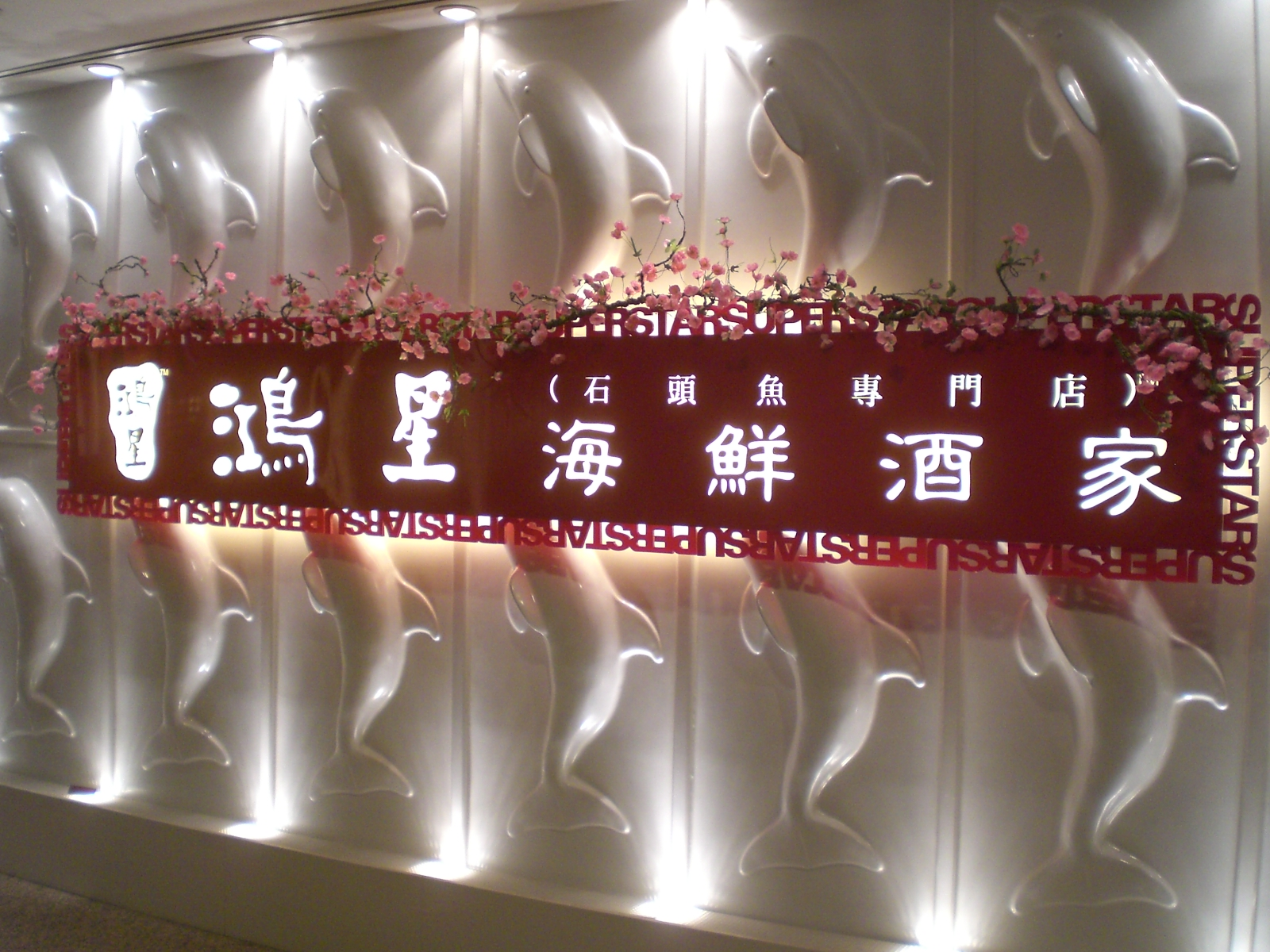 銅鑼灣 時代廣場 食通天, Times Square, Causeway Bay, Hong Kong.